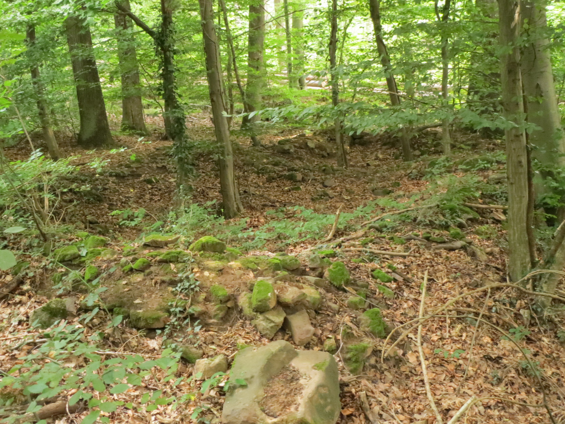 Blick über die Überreste des Turmhauses